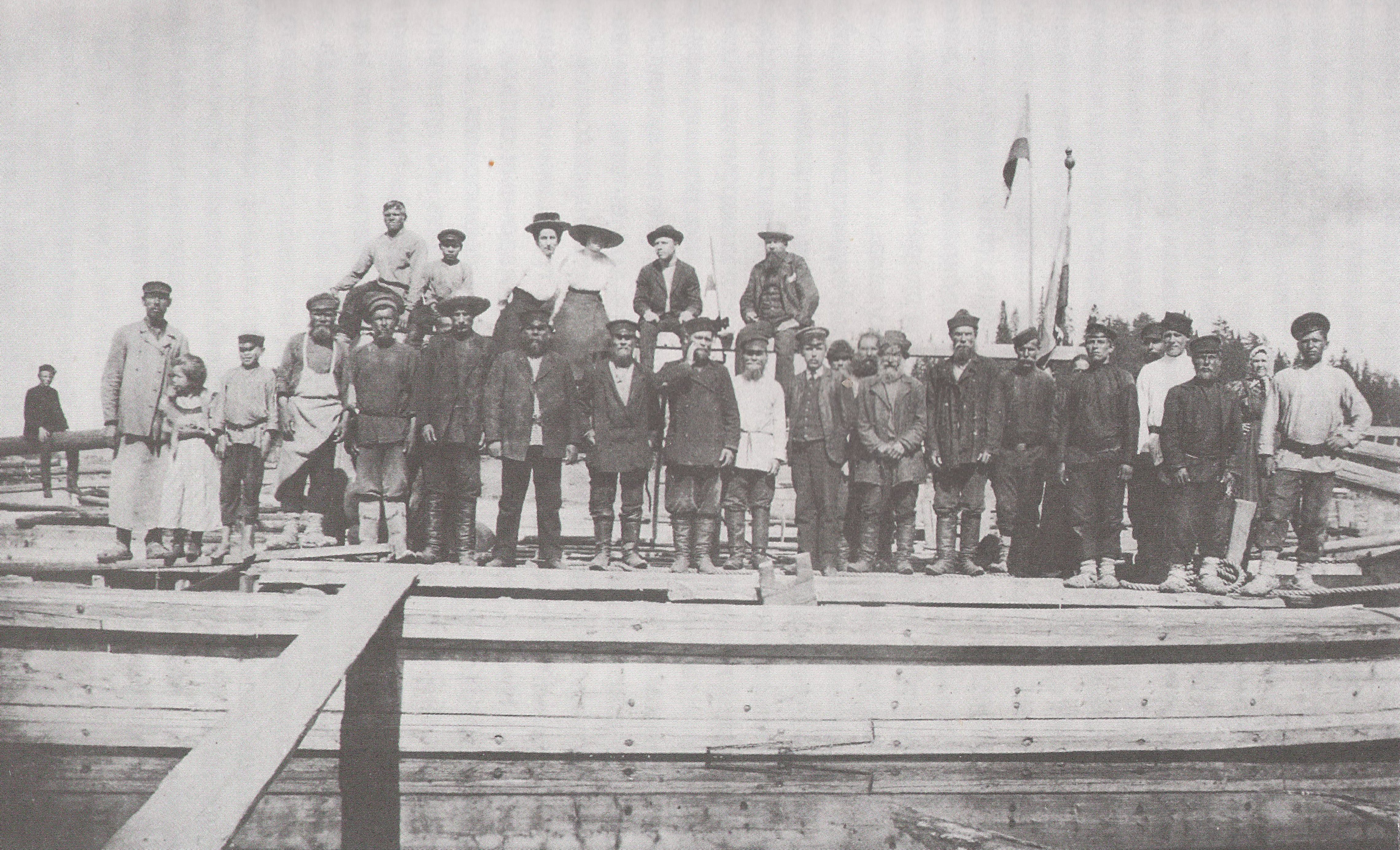 Служащие на барке Билимбаевской пристани, 1898